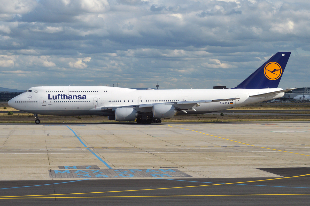 Lufthansa, D-ABYR, Boeing 747-830